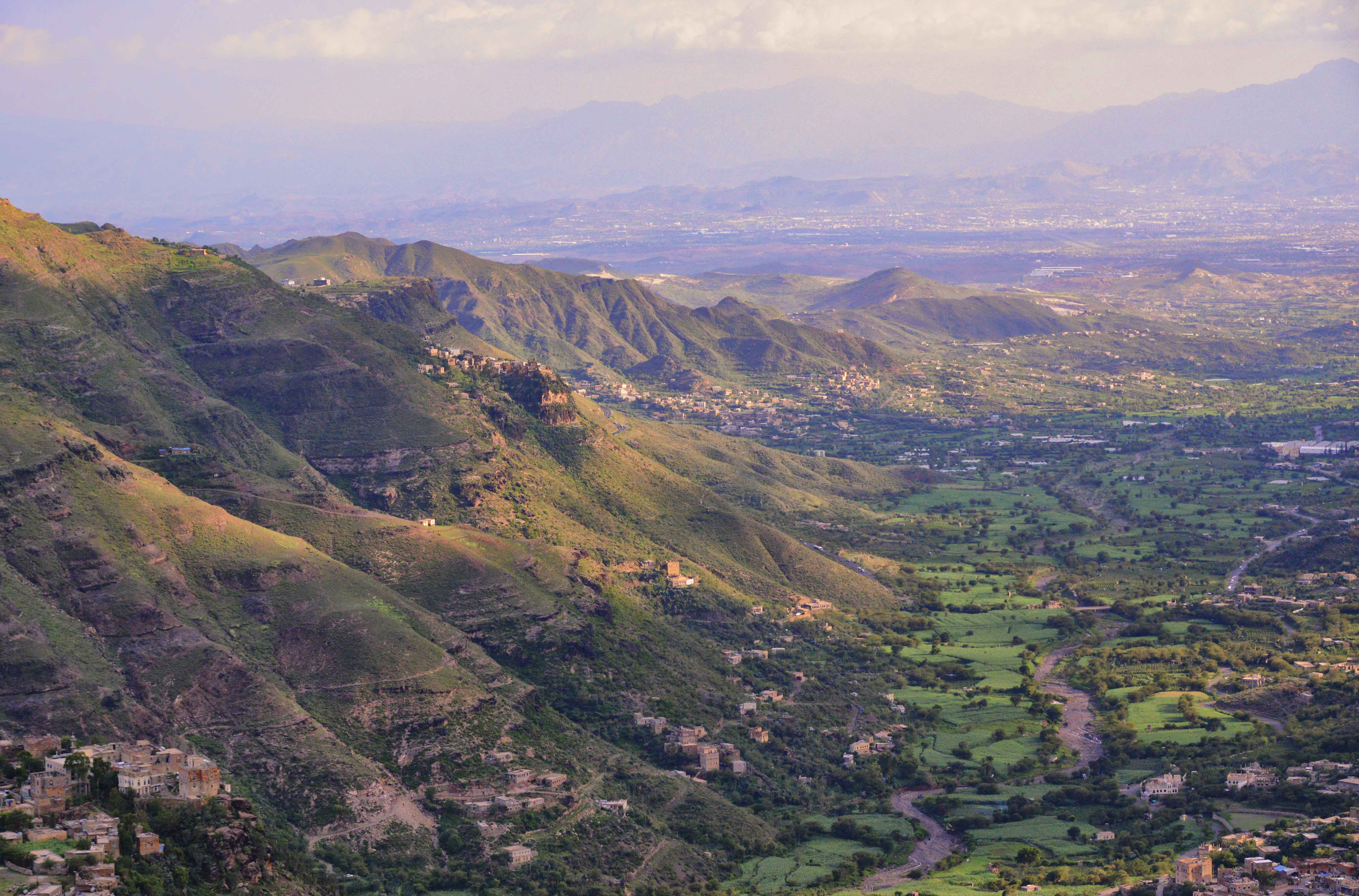 Yemen Landscape